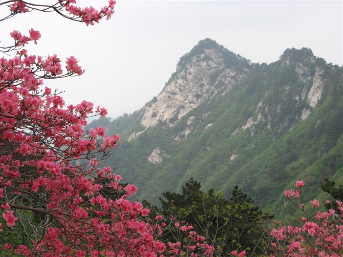 中国湖北省黄岡市麻城市・亀峰山